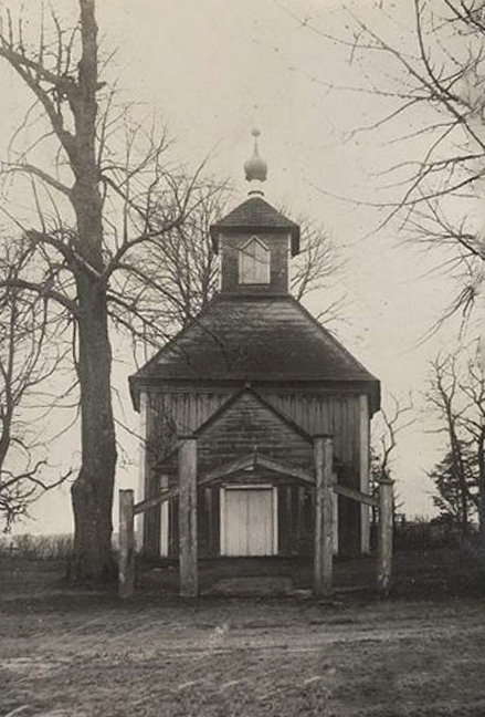 Беларуская (тарашкевіца): Грыўда (Hryŭda). Царква Сьвятога Мікалая